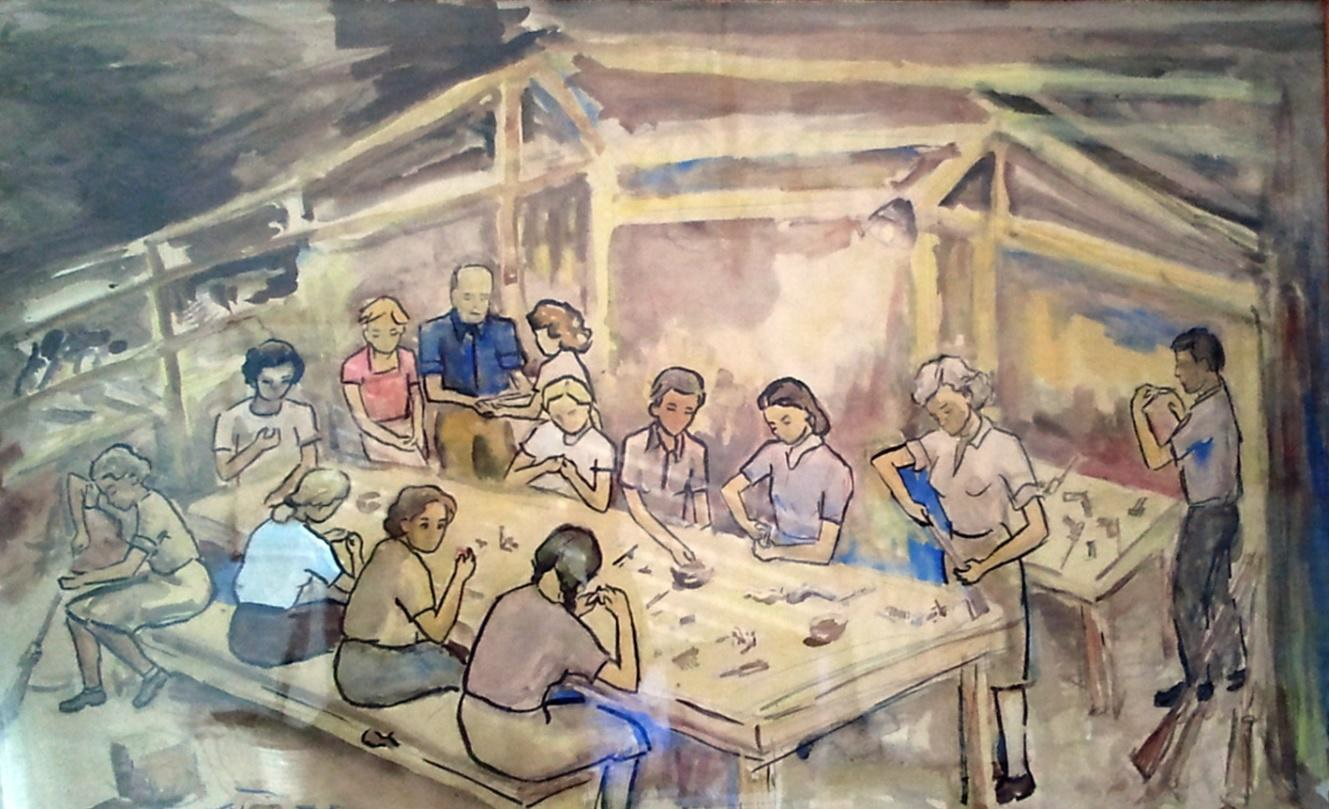 צילום תמונה של טיפול בכלי הנשק בסליק